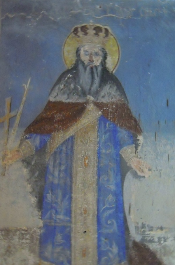 Српски (ћирилица): Св. Краљ Милутин